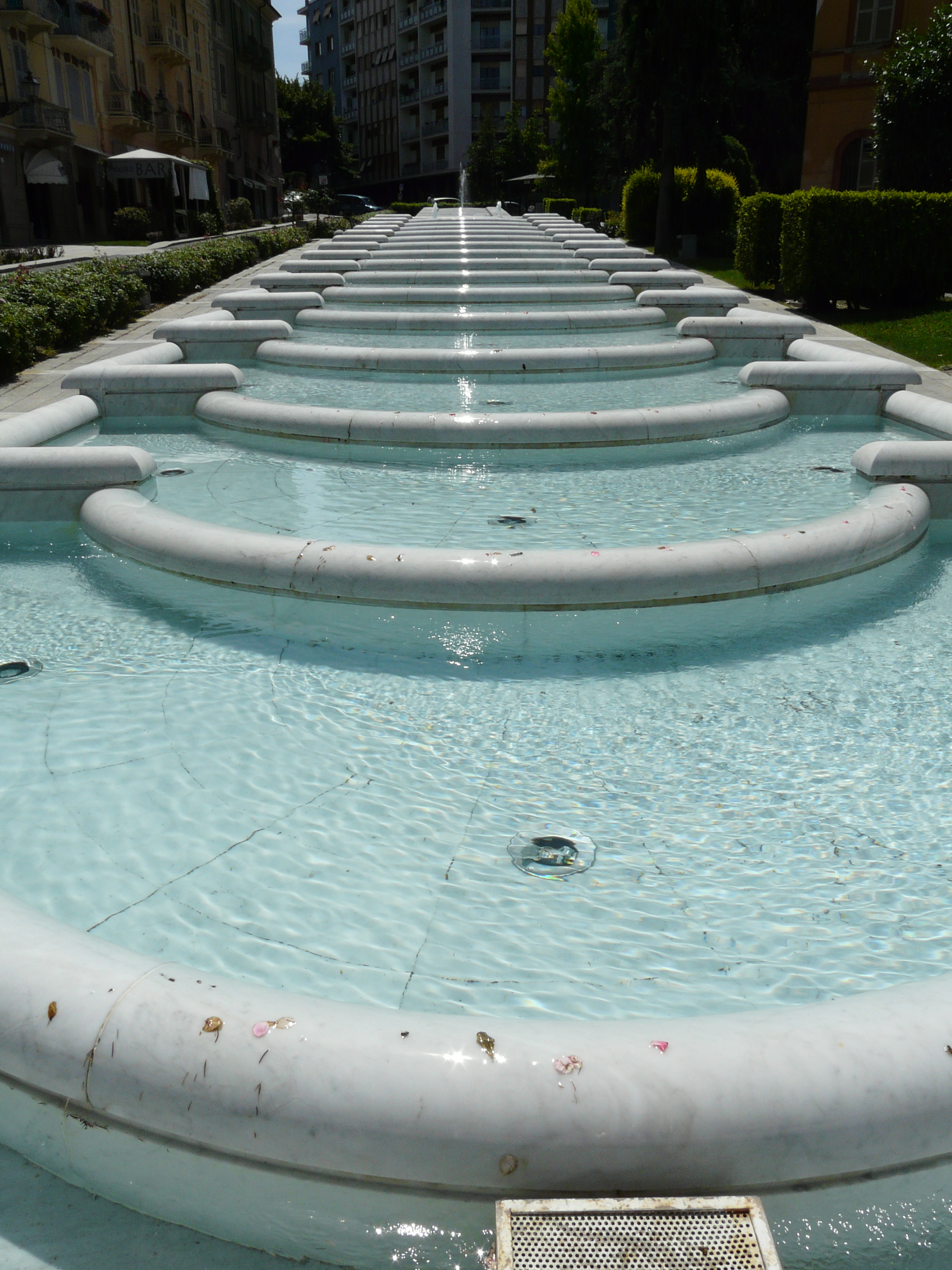 Fontane d'acqua presso piazza Italia, Acqui Terme, Piemonte, Italia